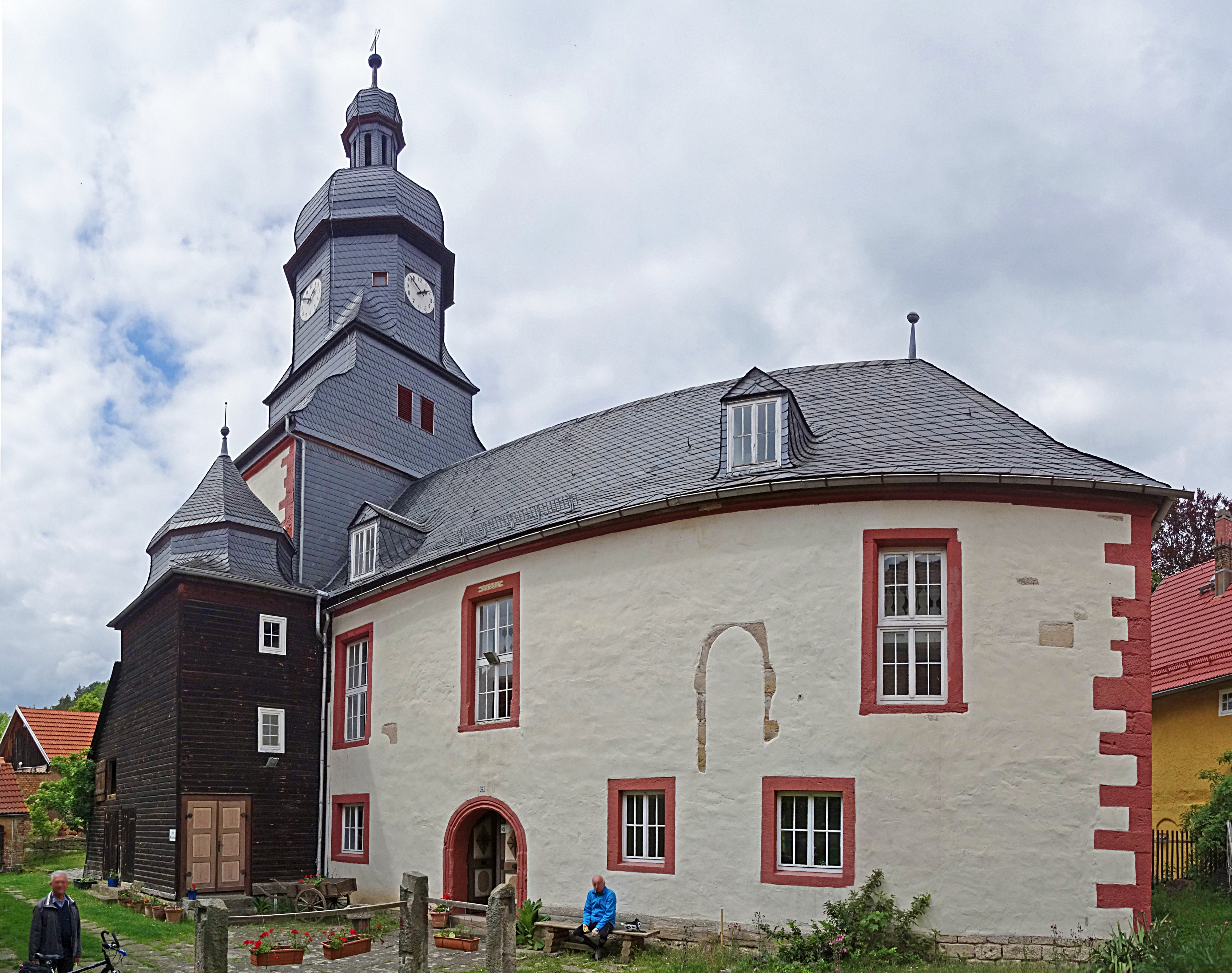 an der Dorfkirche Angelroda